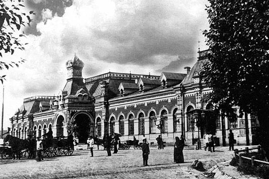 Первое здание железнодорожного вокзала, сооруженное в Екатеринбурге к 1878 году по проекту архитектора Петра Павловича Шрейбера